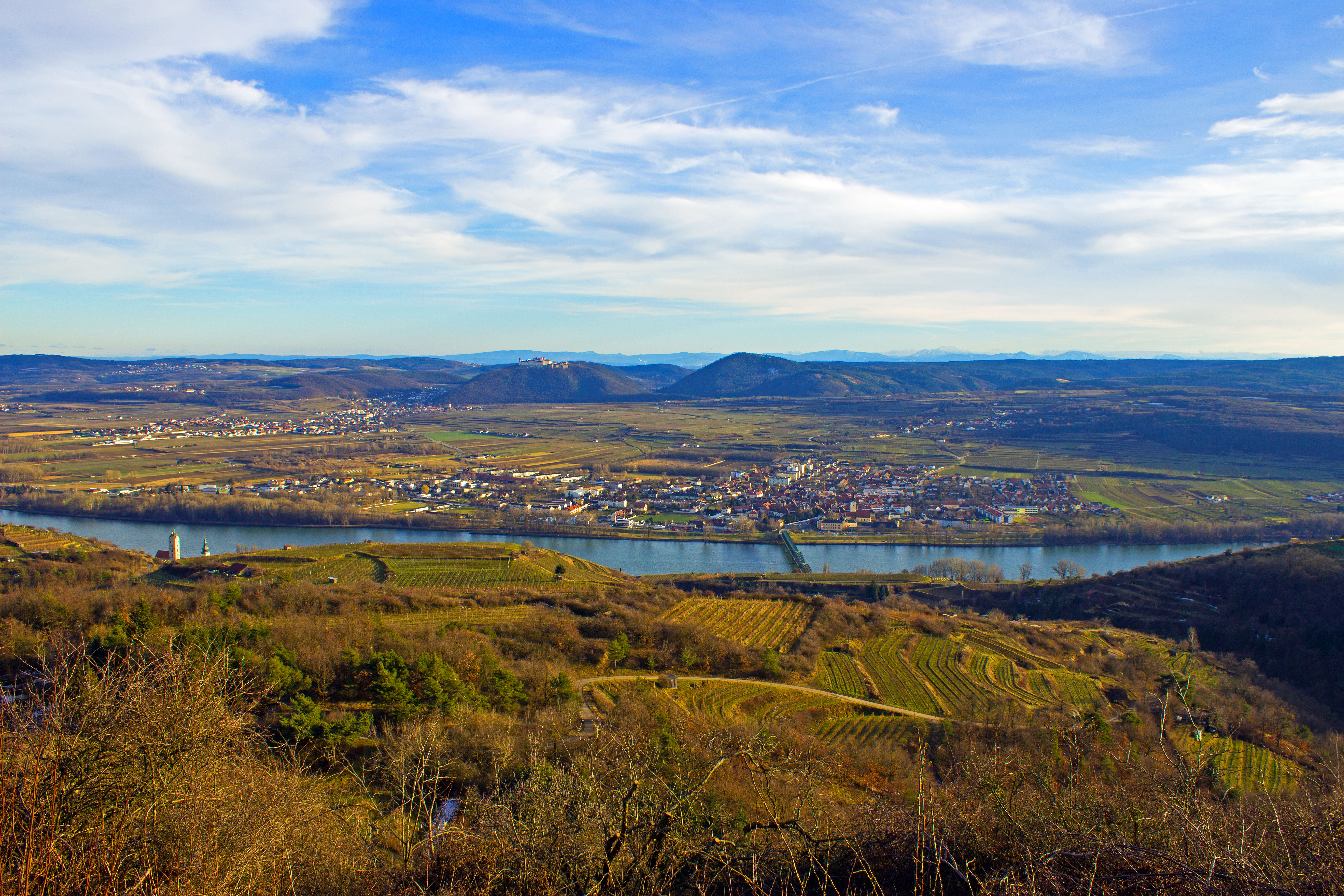 Aussichtswarte Egelsee